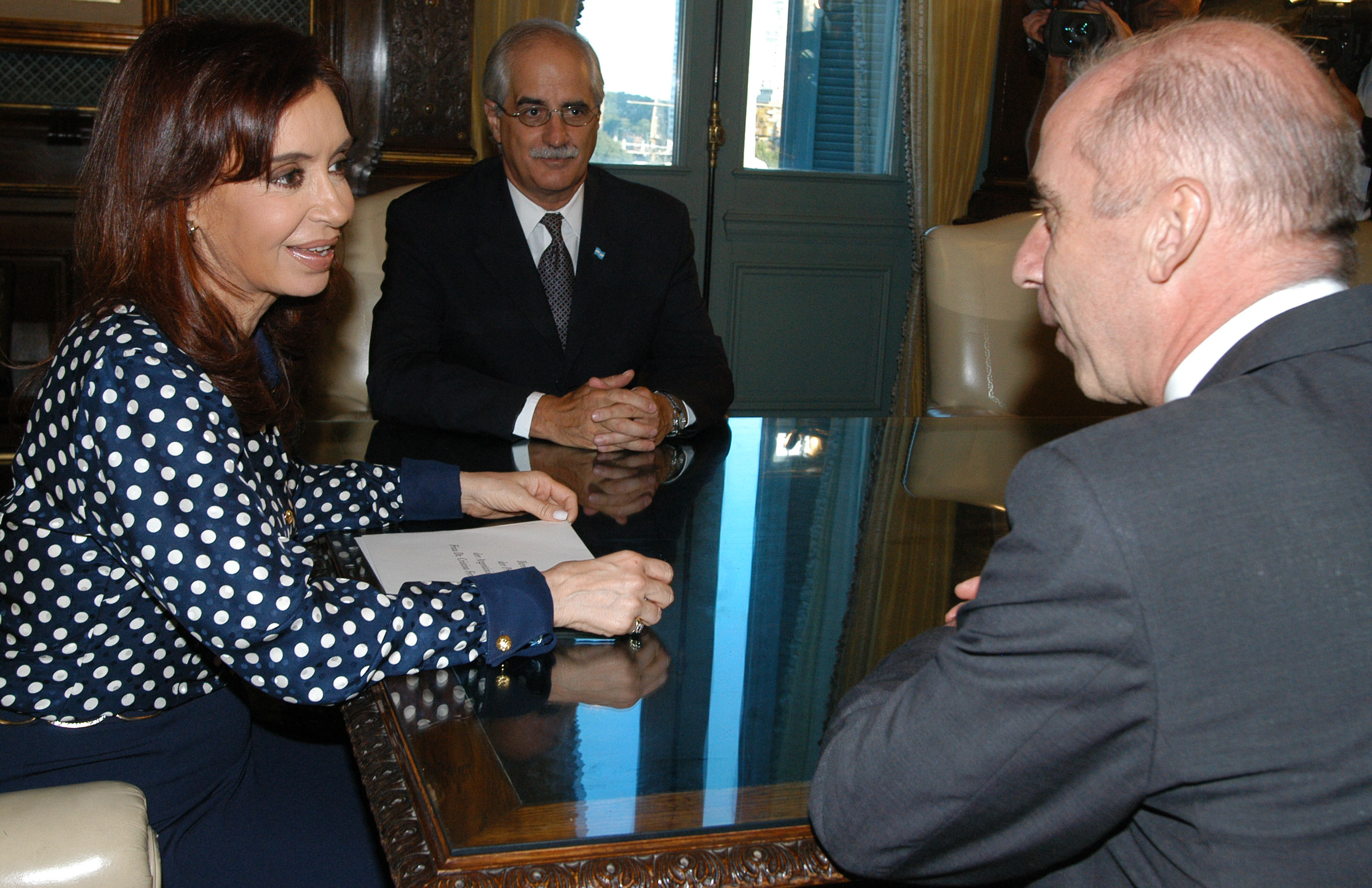 Die Präsidentin von Argentinien, Cristina Fernández de Kirchner, empfängt am 3. Februar 2009 mit ihrem Außenminister, Jorge Taiana, den neuen deutschen Botschafter, Günter Knieß.